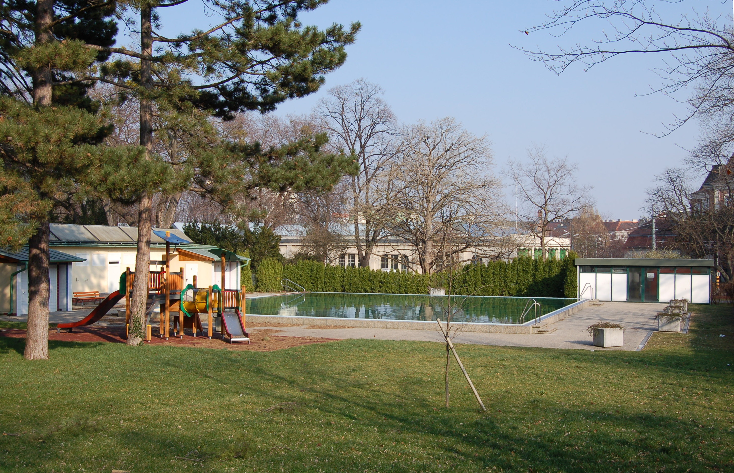 Kinderfreibad Währing, Währinger Park